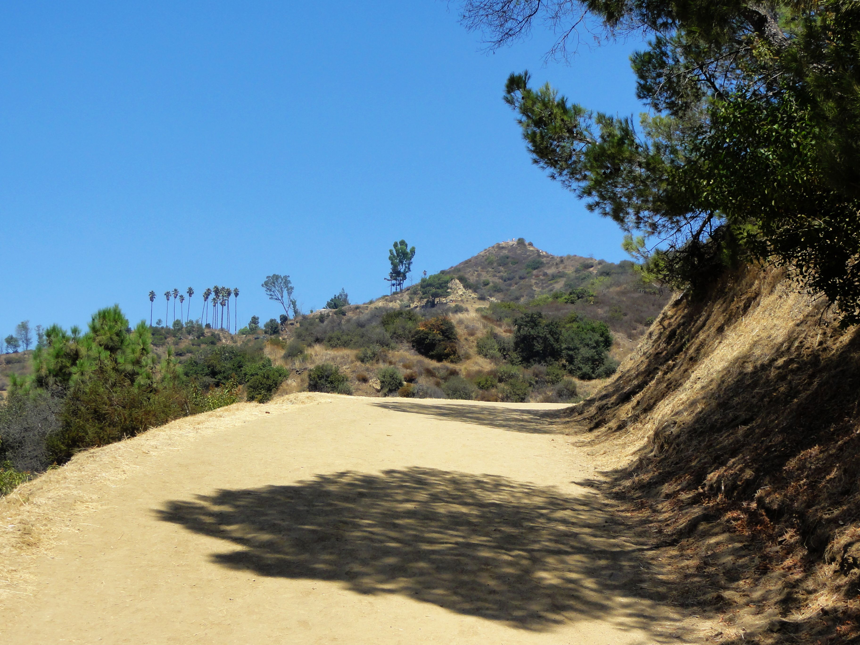 Pohled od jihu na vrchol Mount Hollywood.